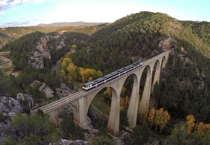 Viaducto Mira